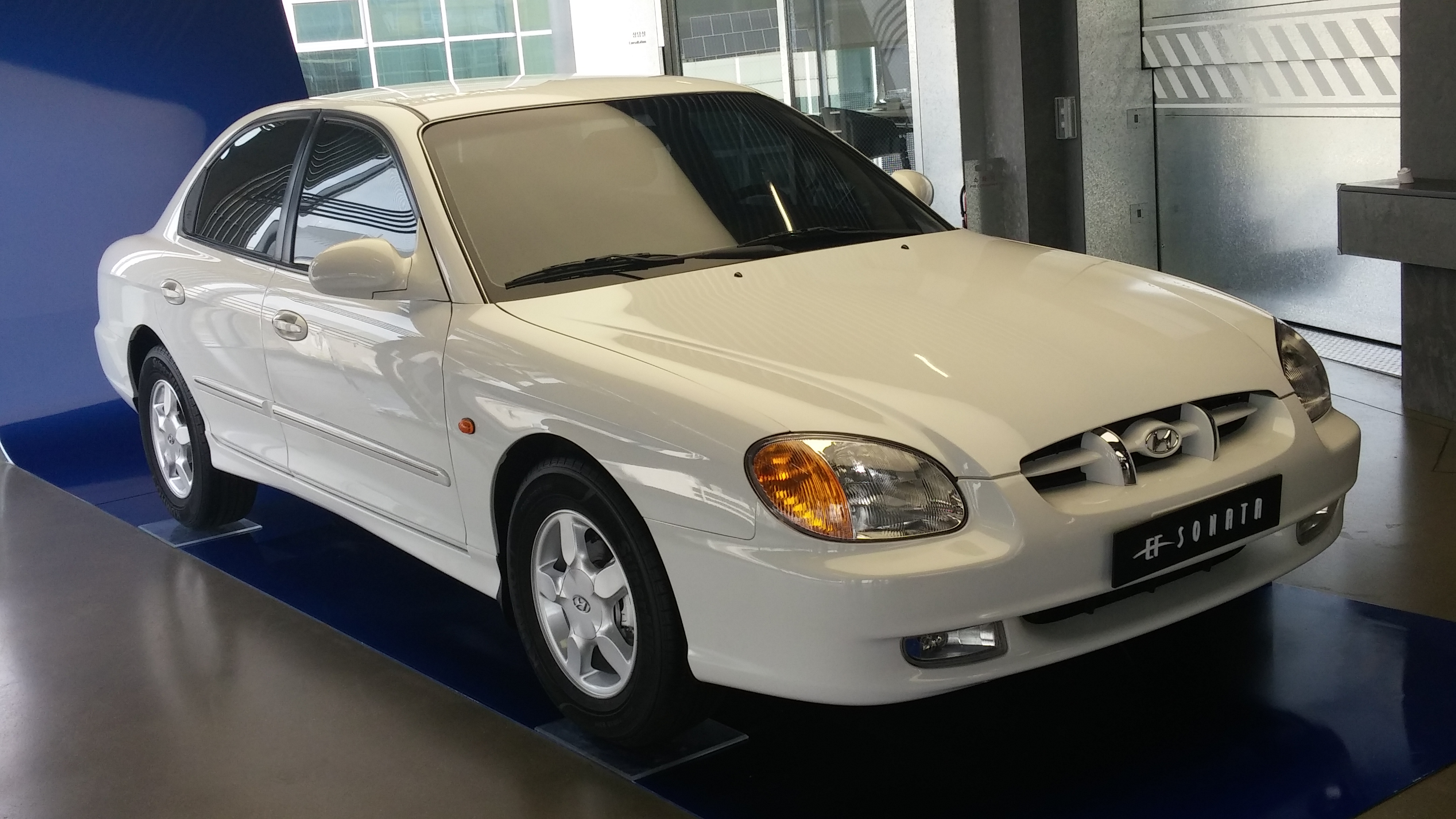 현대 EF쏘나타 정측면